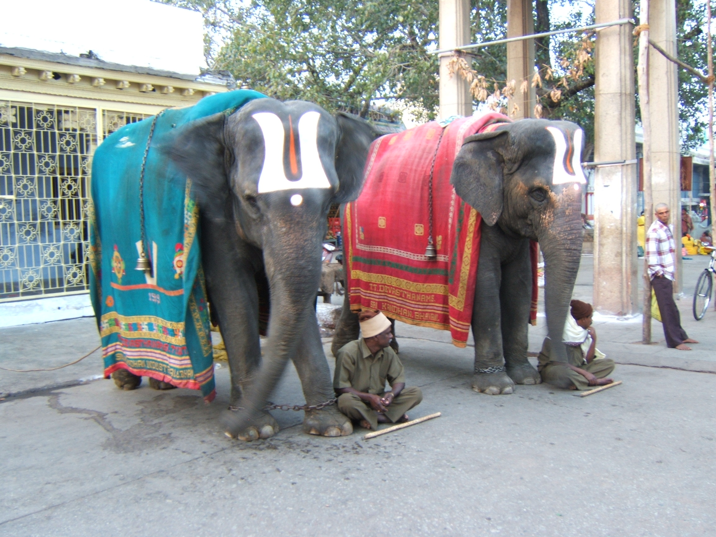 Temple_elephants_Tirupati_India